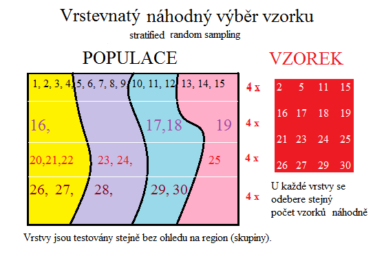 Vrstevnatý náhodný výběr